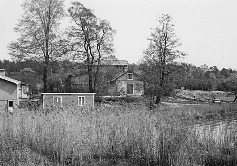 Karlshäll och Ångslupstomten från väster. Brunnsviken i förgrunden.